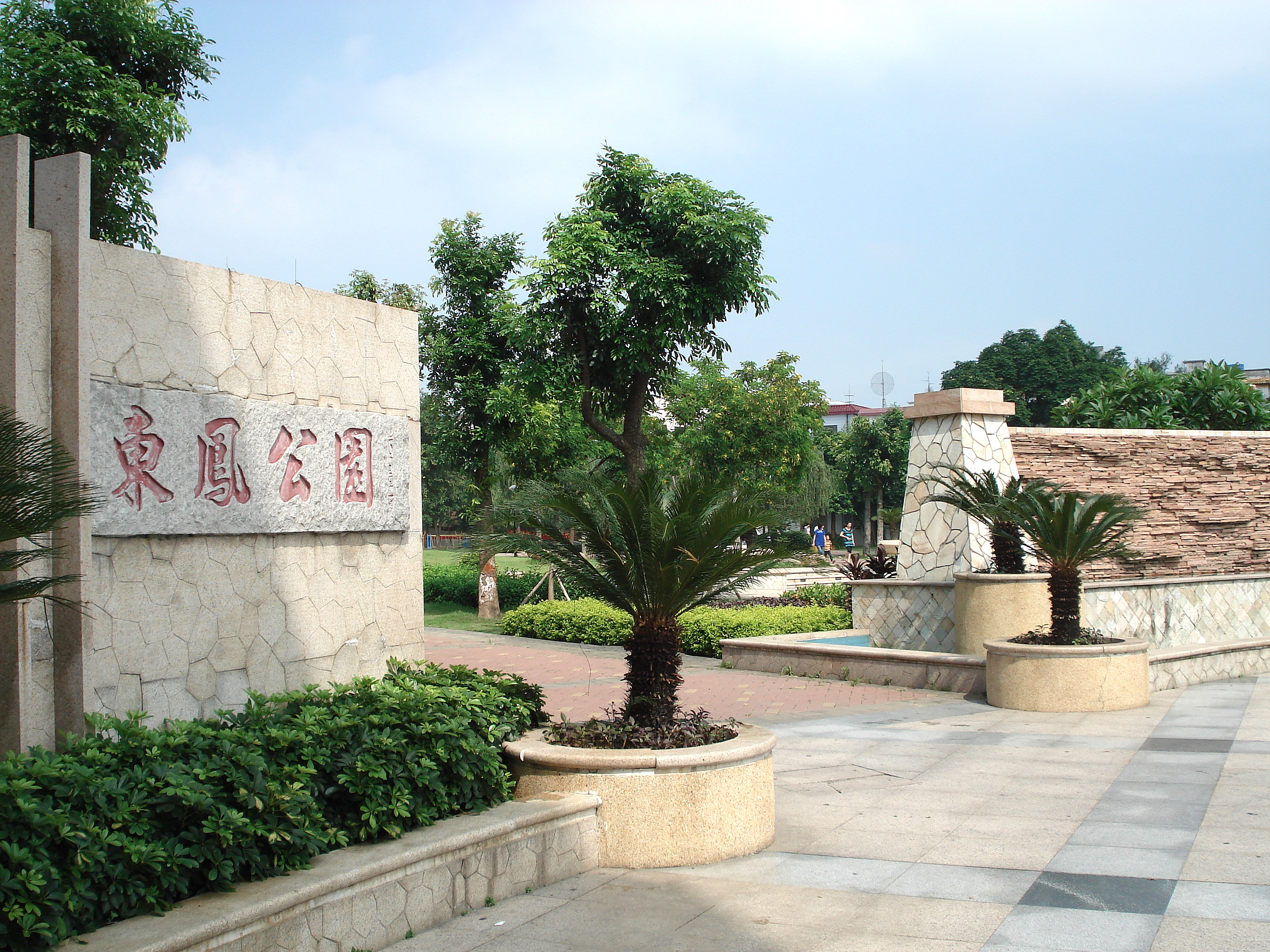 中文（香港）: 中山市東鳳鎮東鳳公園之一出入口